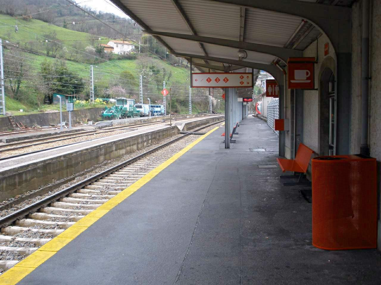 Estación de Pola de Lena (Asturias)